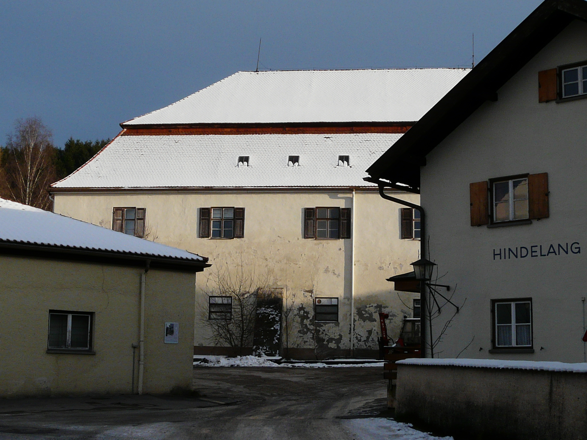 Ehem. Klosterbrauerei in Steingaden